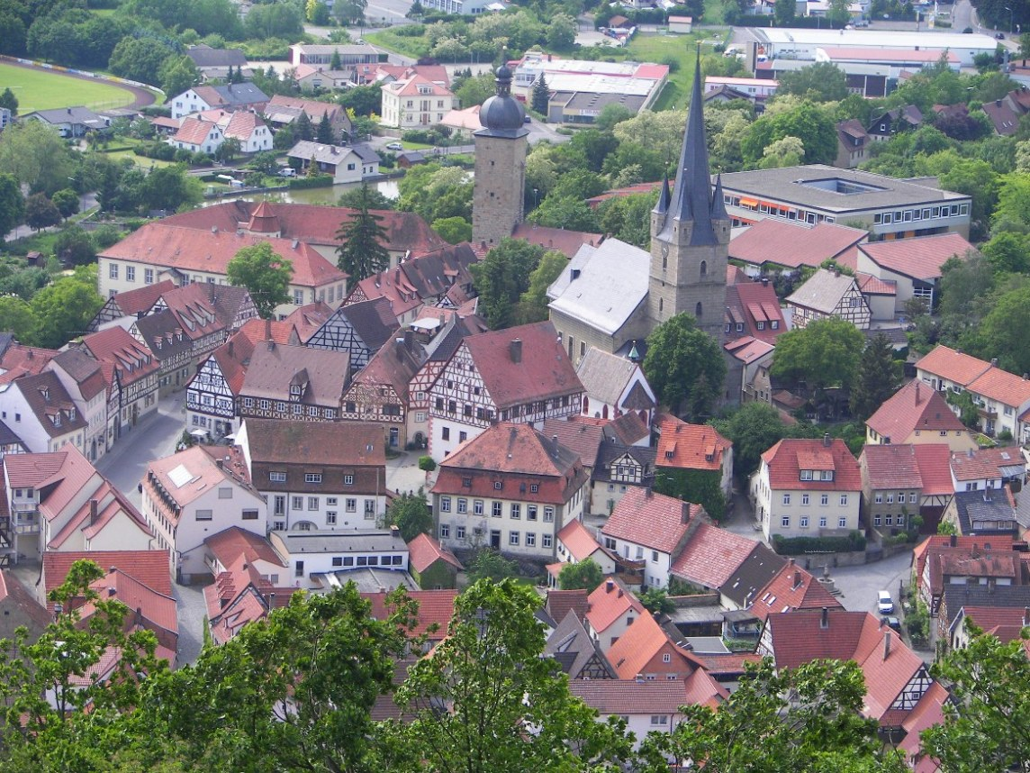 Das Zentrum von Zeil am Main von der Kapelle aus